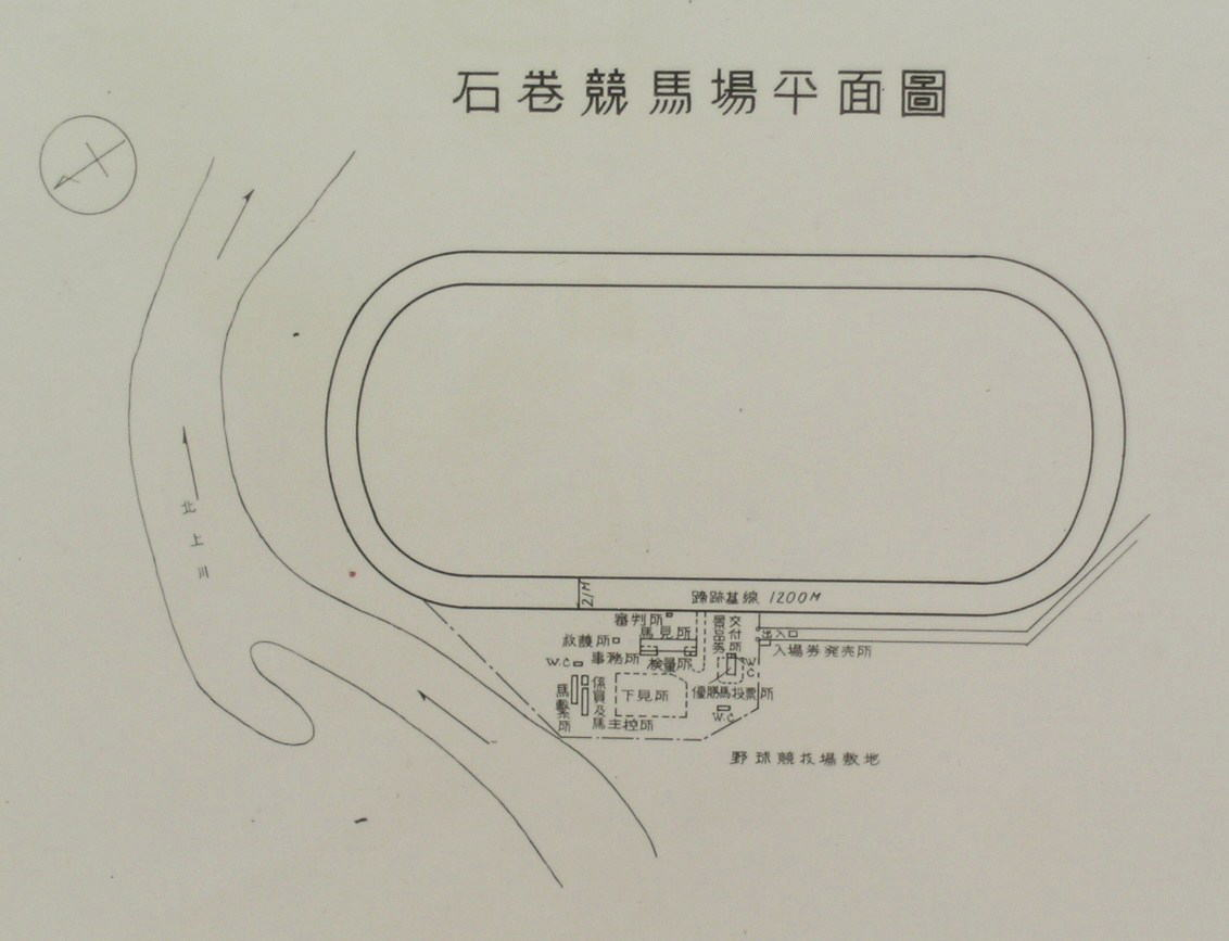 昭和14年発行の著作権保護期間満了済の図面にコントラスト修正を加えました。石巻競馬場(水押)の平面図です。